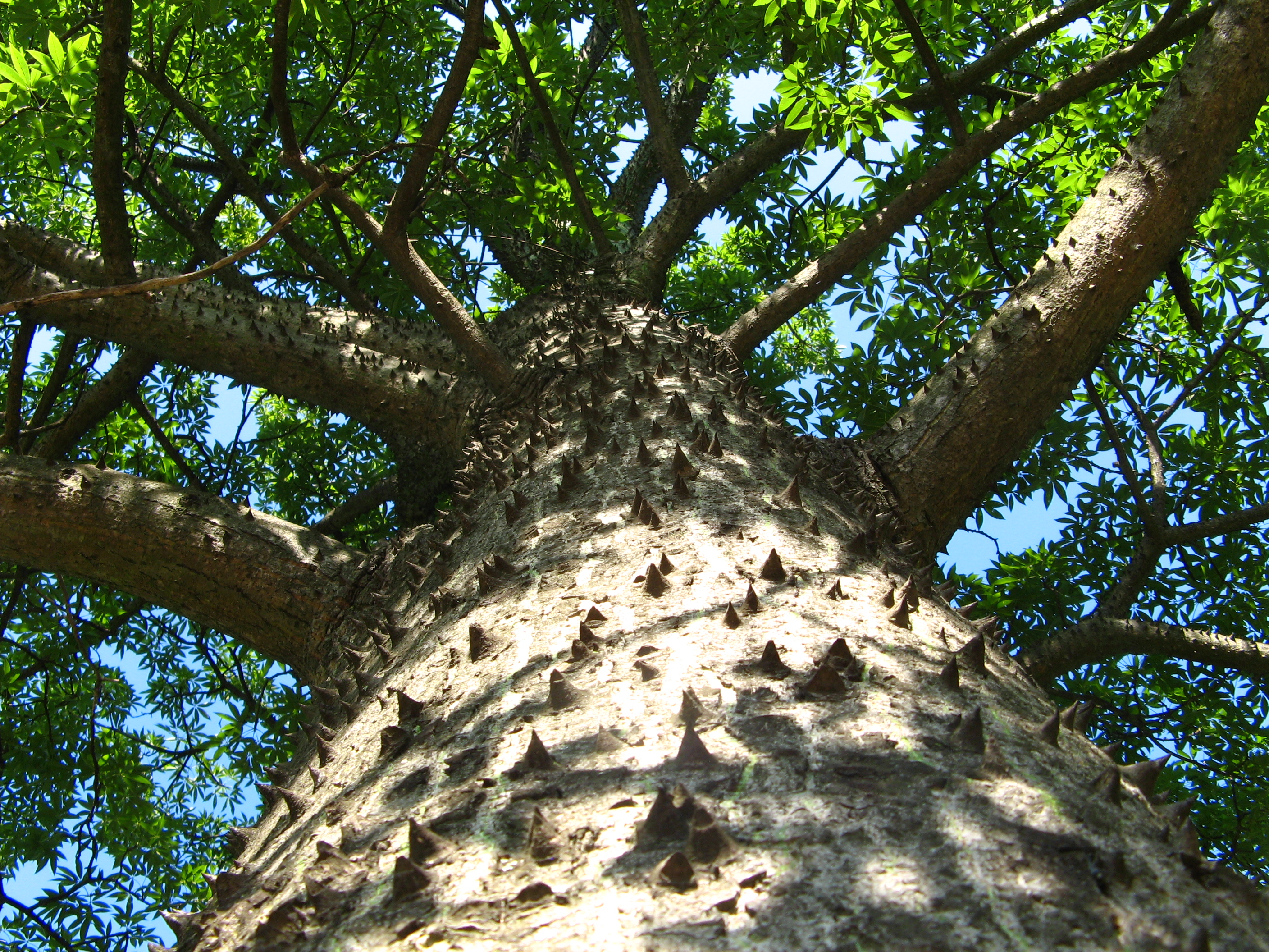 caulke de paineira espinhuda